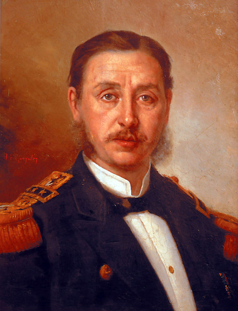 Carlos Arnaldo Condell de la Haza (* Valparaíso, 14 de agosto de 1843 - † Quilpué, 24 de noviembre de 1887) fue un héroe naval chileno. Participó activamente en la guerra Hispano-Sudamericana y en la Guerra del Pacífico.